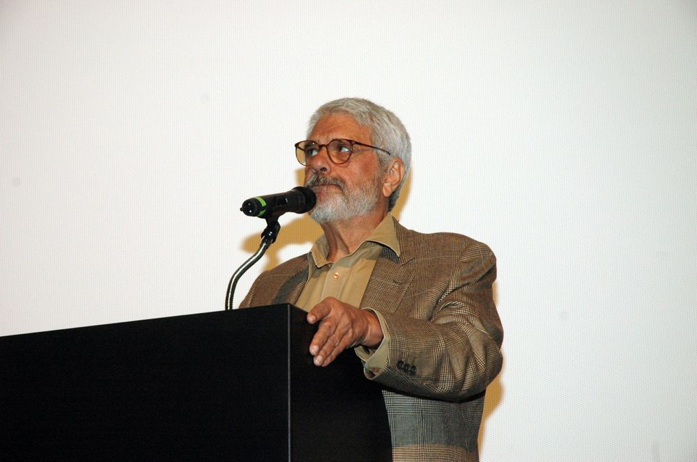 Restauração Xica da Silva - O diretor do CTAv e presidente do Conselho da Cinemateca, Gustavo Dahl, na cerimônia de lançamento do filme restaurado pela Cinemateca Brasileira-SAv-MinC Foto: Augusto Canuto